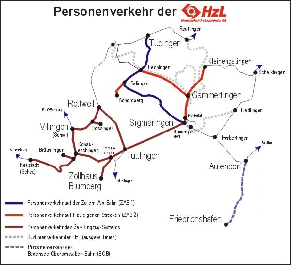 Streckennetz der Hohenzollerischen Landesbahn AG (HzL), Hechingen, Stand 10.2006